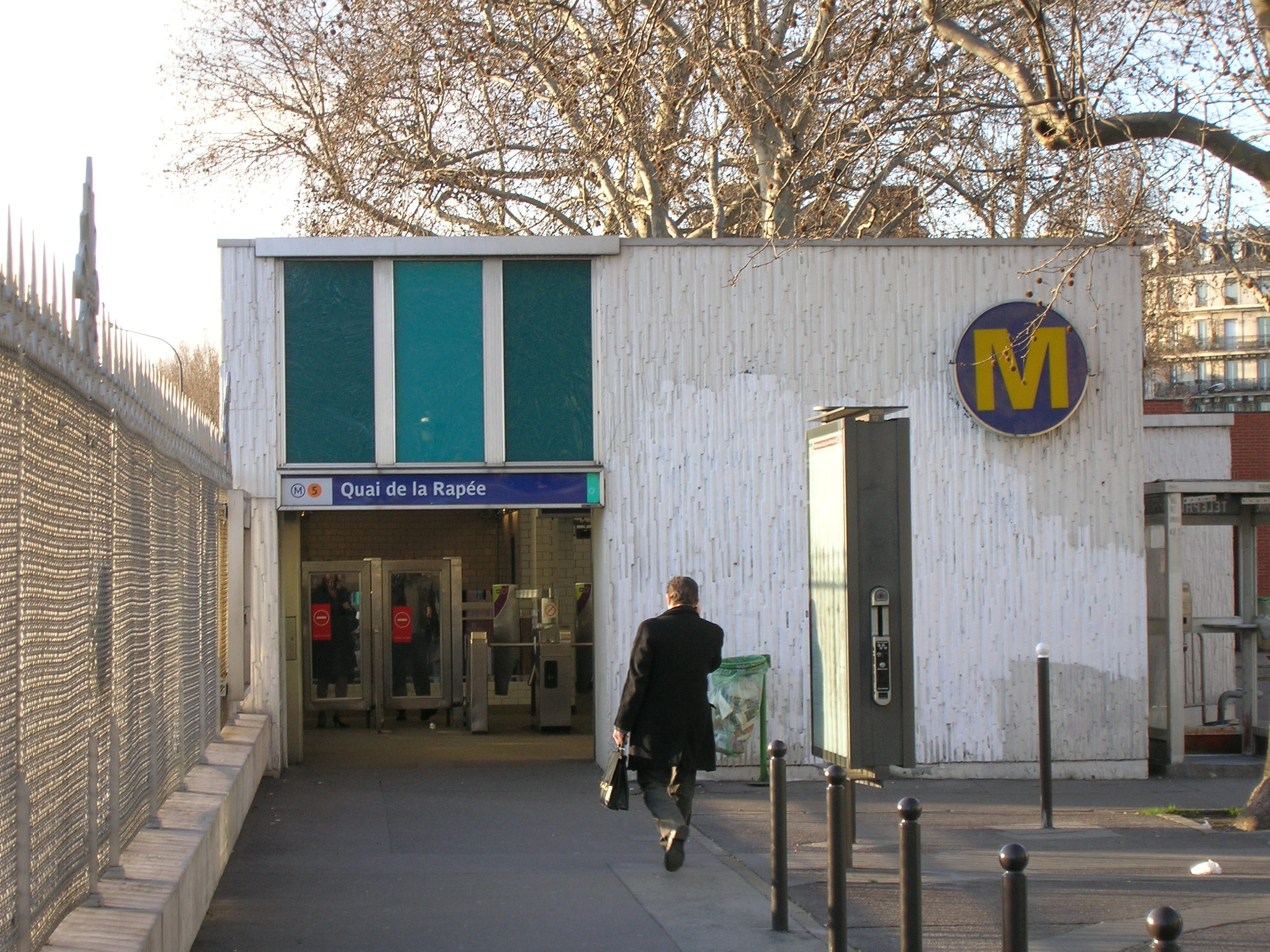 L'entre de la station "Quai de la Rapée" de la ligne 5 du métro de Paris, France